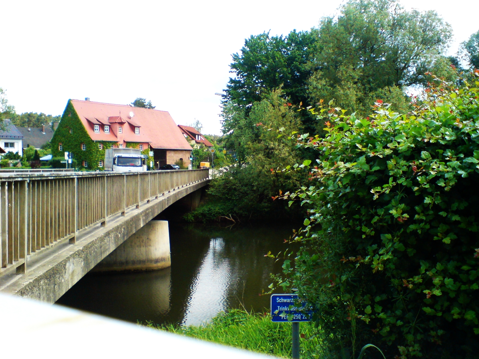 Straßenbrücke über die Schwarzach bei Neuses